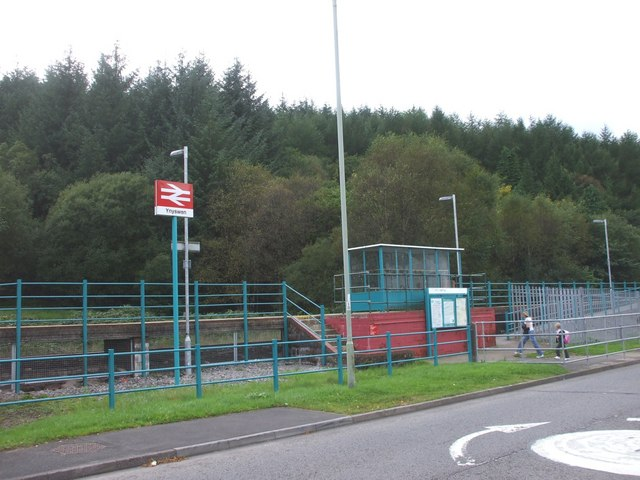 Ynyswen railway station